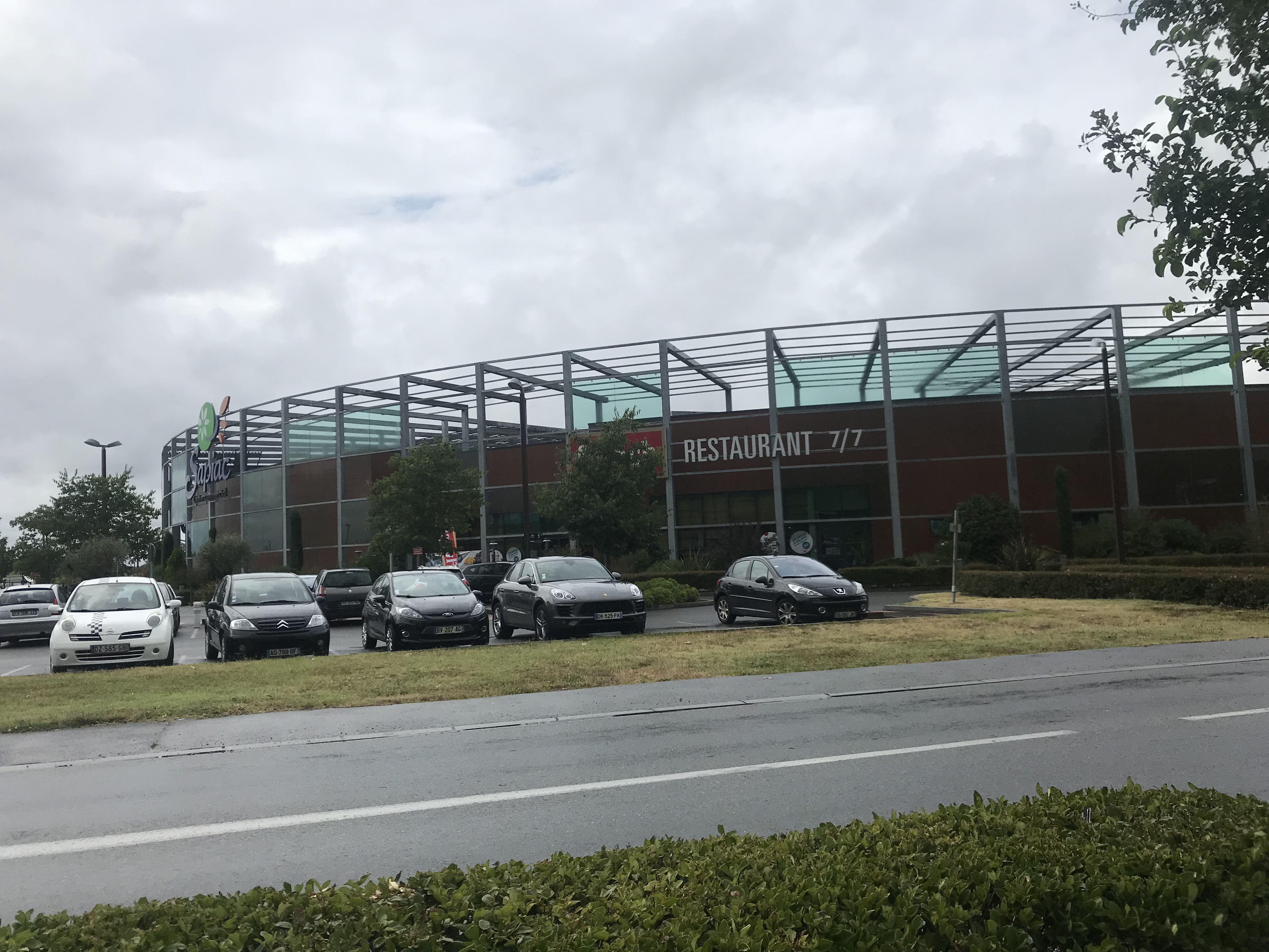 le centre commercial de Sapiac à Montauban (82)